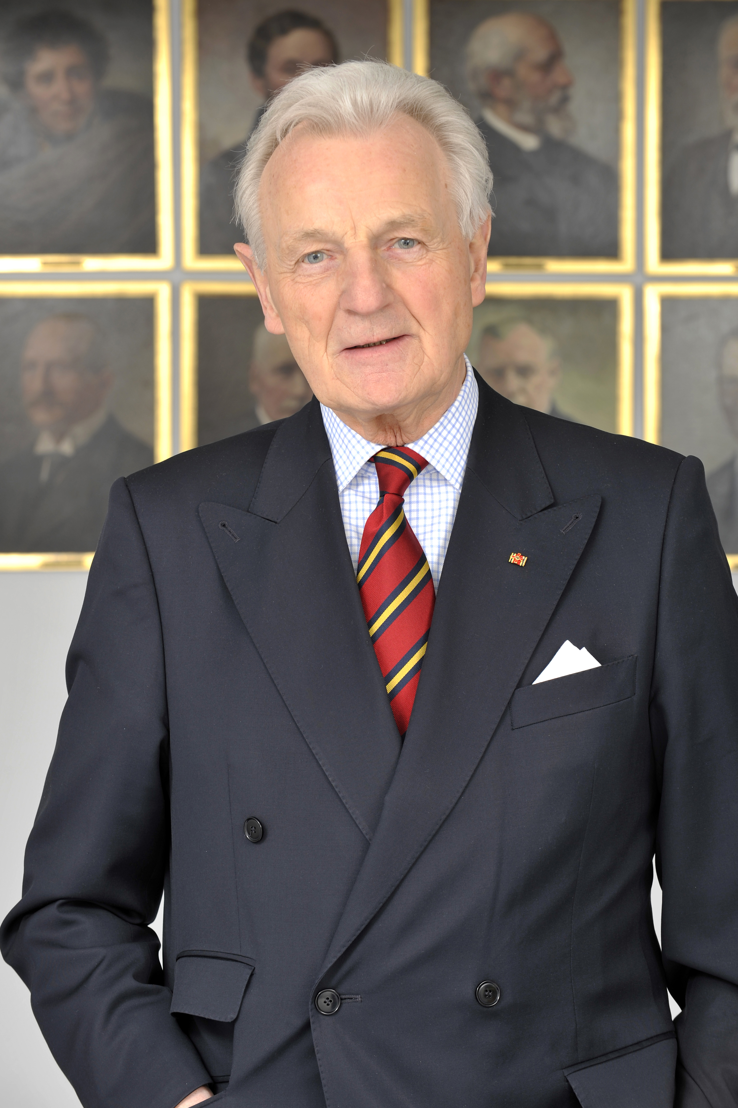 Prof. Dr. Klaus Ring vor der Präsidentengalerie der Polytechnischen Gesellschaft e. V. (Foto: Stefan Krutsch / Stiftung Polytechnische Gesellschaft Frankfuzt am Main).